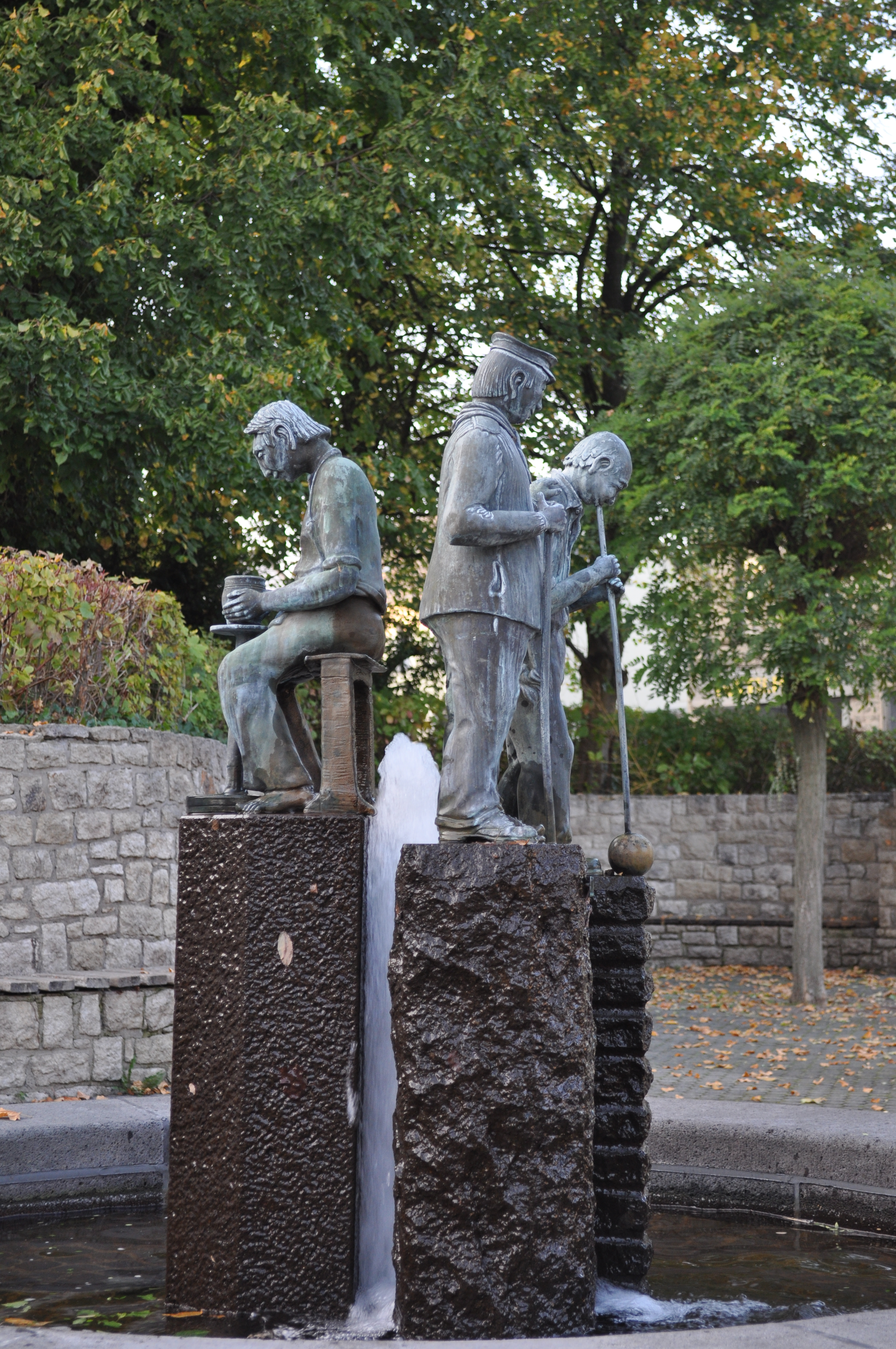 Brunnen in Wirges. Der Brunnen zeigt Töpfer und Glasbläser - die wichtigsten Erwerbszweige des Ortes